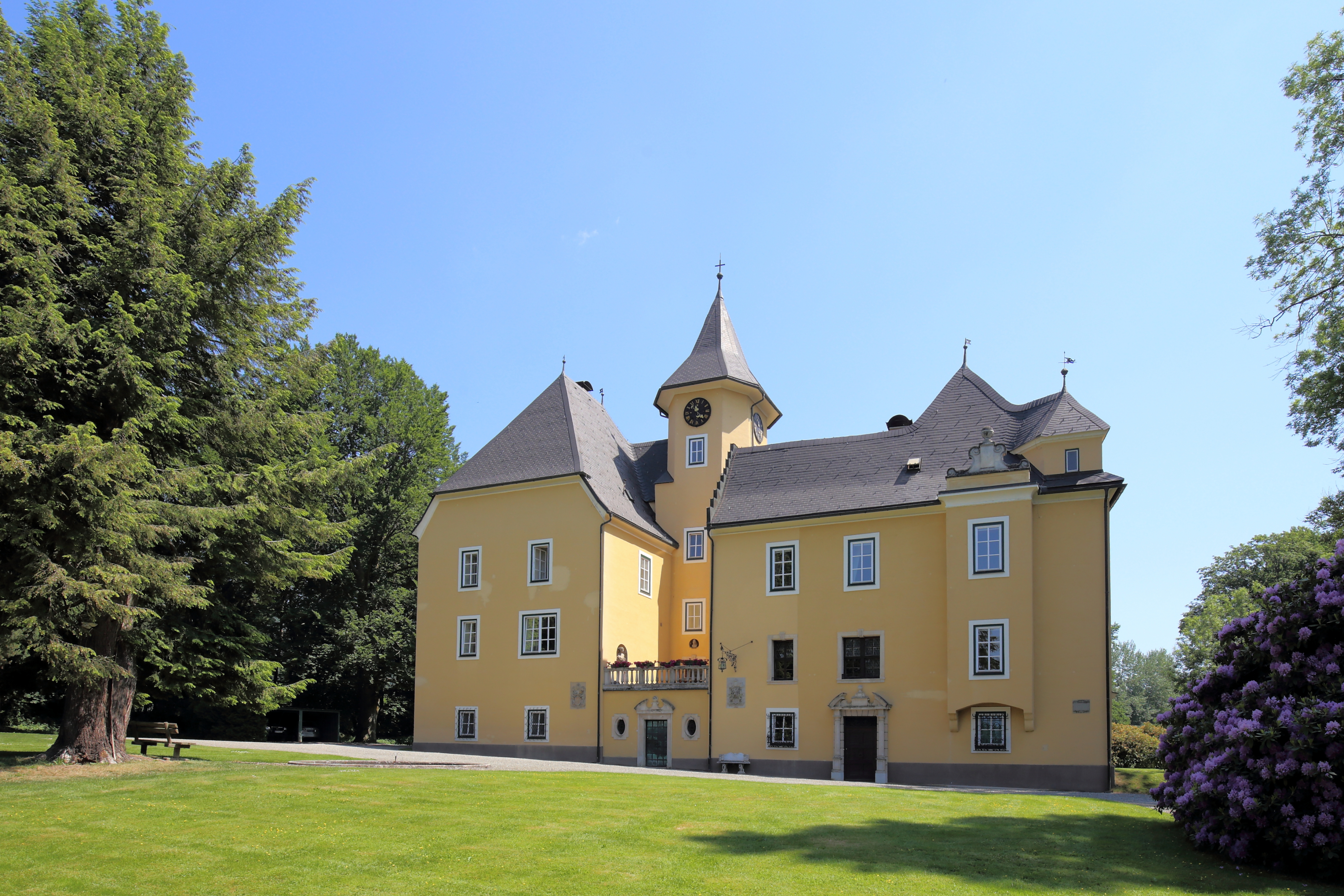 Schloss Prankh in der österreichischen Gemeinde Sankt Marein-Feistritz im steirischen Bezirk Murtal. Urkundlich 1135 und 1459 erwähnt. Ursprünglich vermutlich zwei Schlösser, die zusammengefasst wurden. Das Schloss war Anfang des 19. Jahrhundert dem Verfall preisgegeben und ist durch Erneuerungsbauten 1879 sowie 1901 stark entstellt.